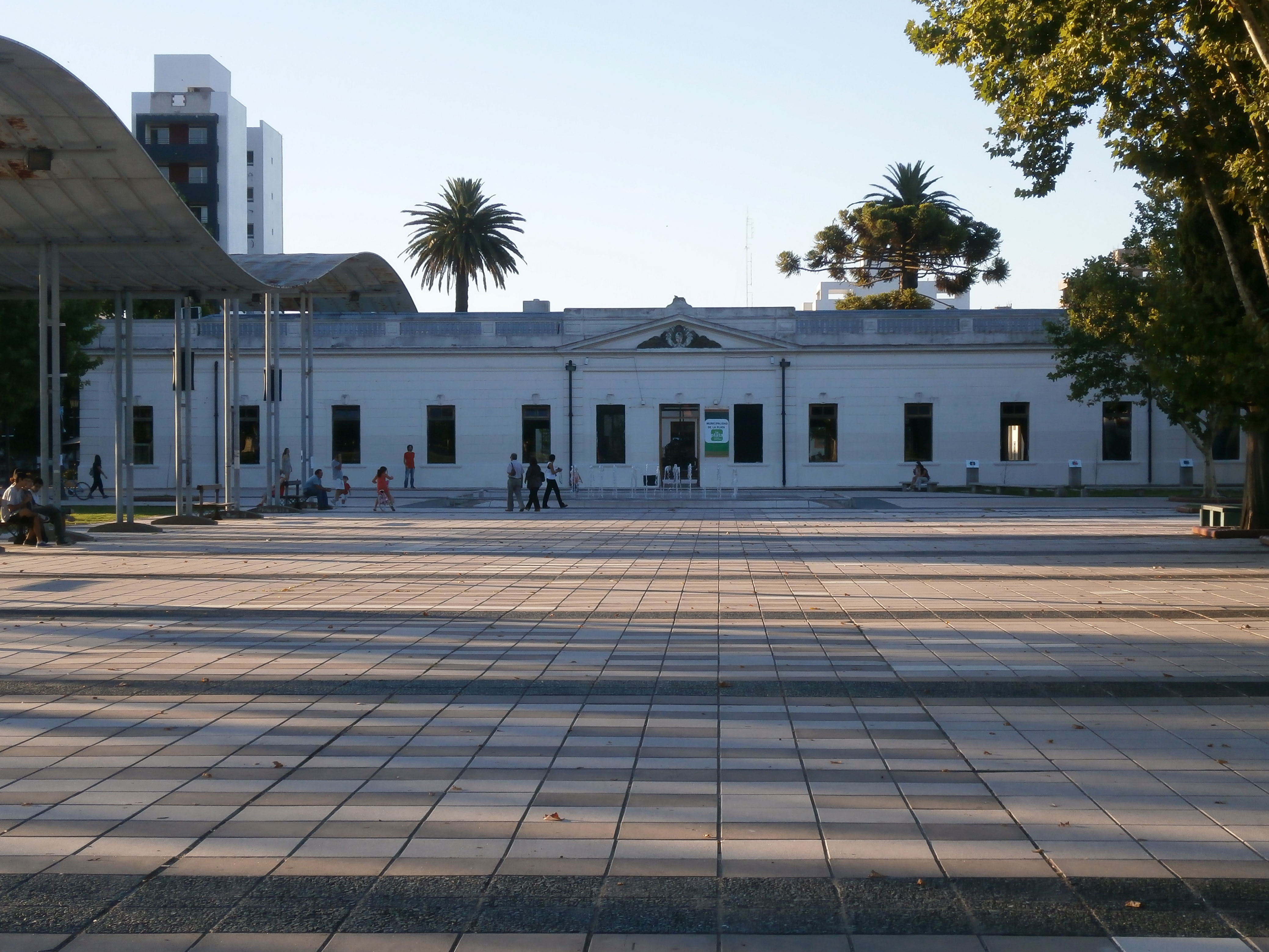 Fachada del Centro Cultural Islas Malvinas, antiguo Casino de Oficiales del Regimiento 7 de Infantería en la ciudad de La Plata, capital de la Provincia de Buenos Aires, Argentina.